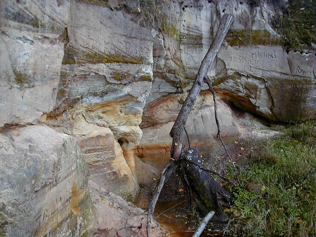 Jeru klintis ar alām pie Rūjas 2004-09-25